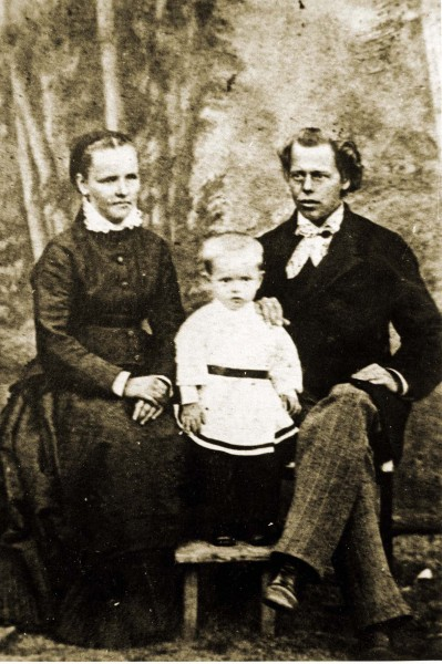 Павел Бажов и родители